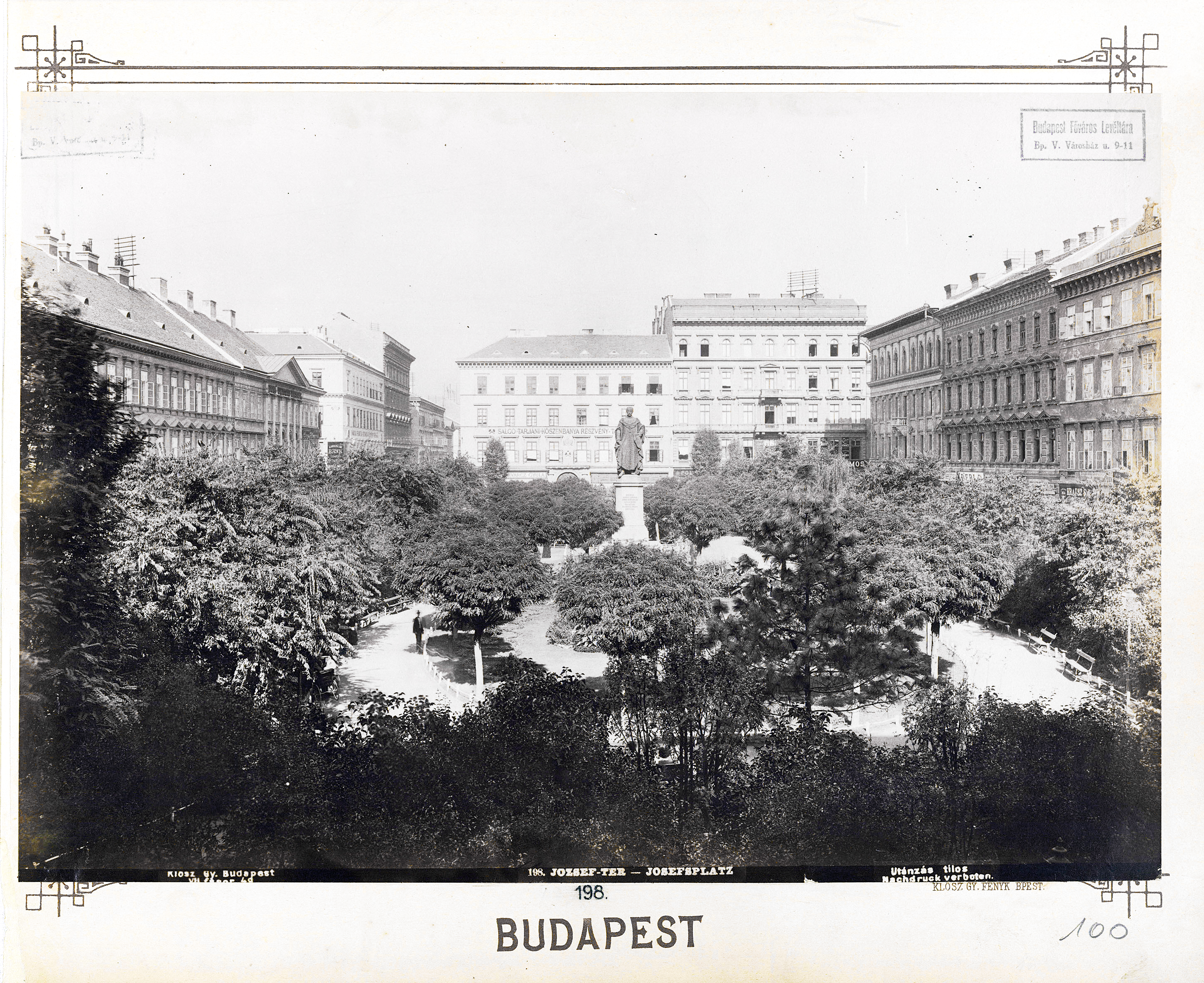 József nádor (József) tér, József nádor emlékmű. Location: Hungary, Budapest V. Tags: Budapest